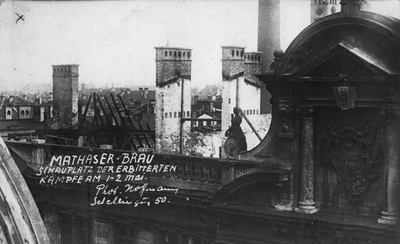 Mathäser-Bräu Schauplatz der erbitterten Kämpfe am 1-2 Mai Phot. Hoffmann, Schellingstr. 50